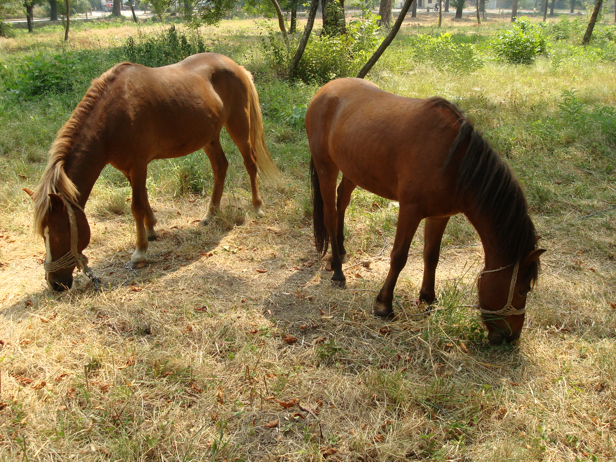 Коњи на паши.